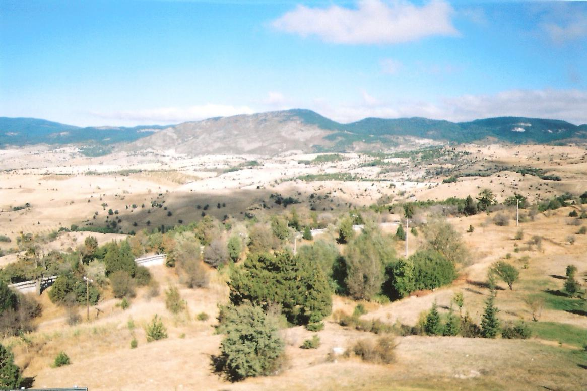 Dumlupınar Şehitliği View